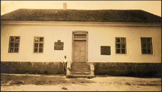 Српски (ћирилица): Зграда Основне школе у Јамници, гдје је одржана Јамничка скупштина 1976. године